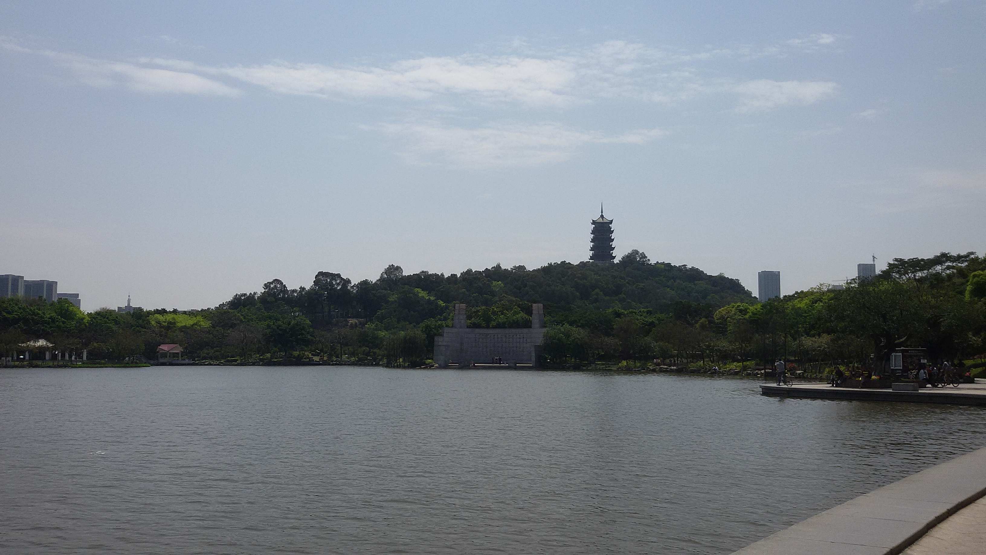 粵語: 𧒽崗公園